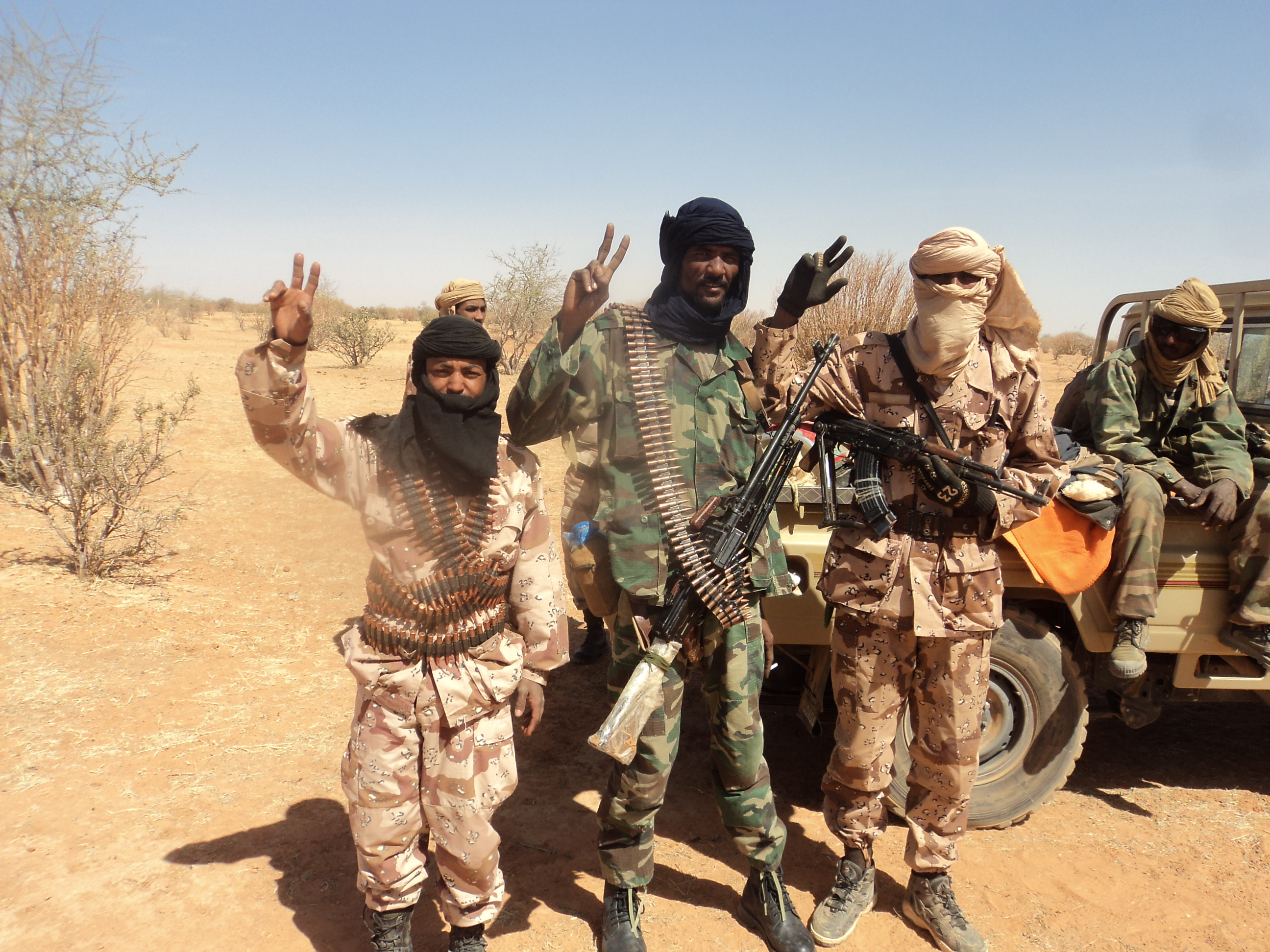 Touareg secessionists say their declaration of independence doesn't close the door to dialogue. انفصاليو الطوارق يقولون إن إعلانهم الاستقلال لا يغلق باب الحوار. Les sécessionnistes touaregs affirment que leur déclaration d'indépendance ne ferme pas la porte au dialogue.